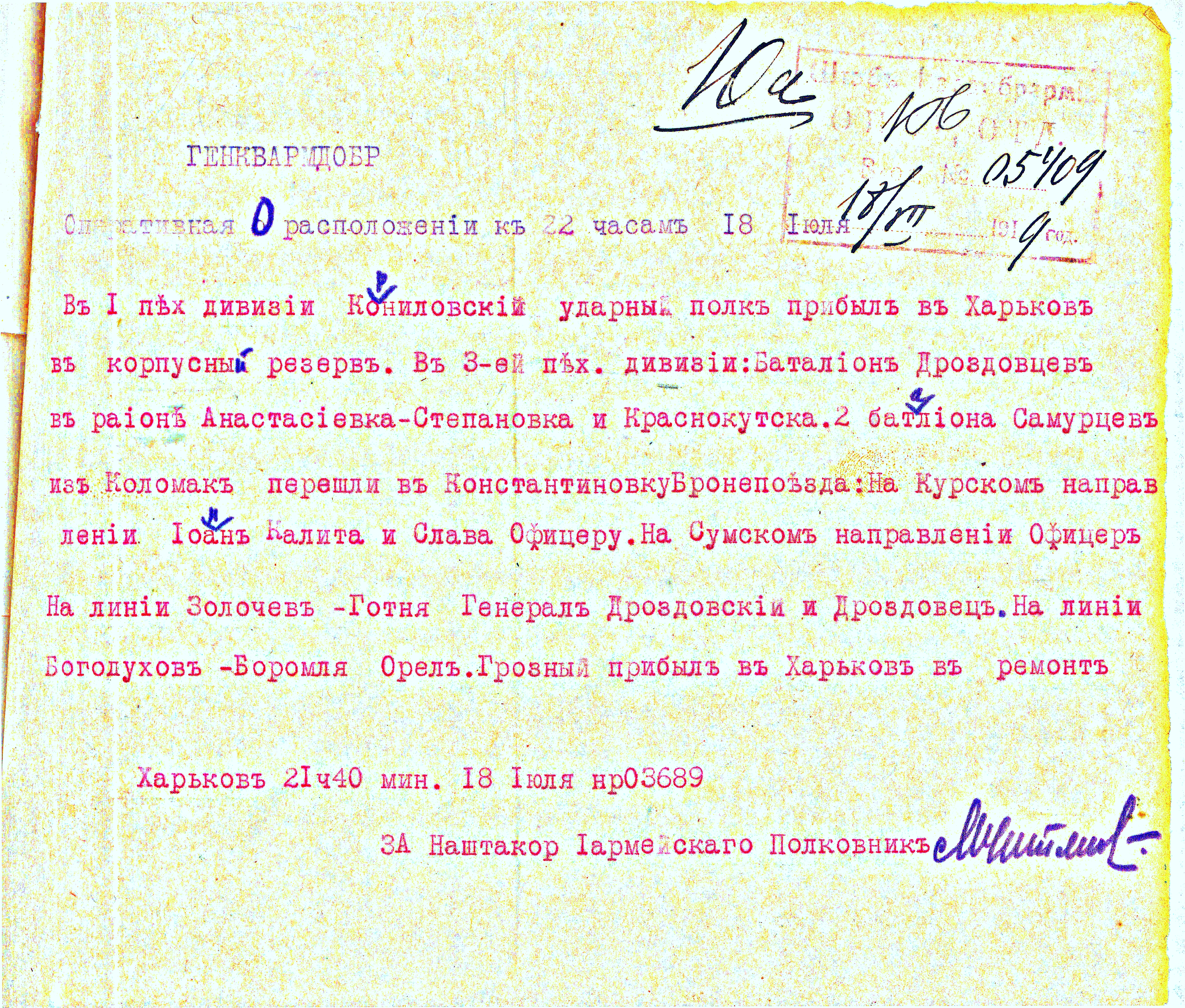 Дислокация бронепоездов Добровольческой Армии к 22.00 18 июля 1919 г.